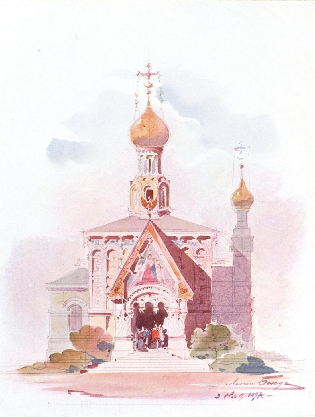 Эскиз православной церкви в Дармштадте.